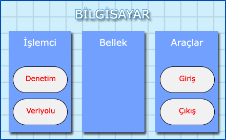 Bilgisarın 5 ana bileşeni